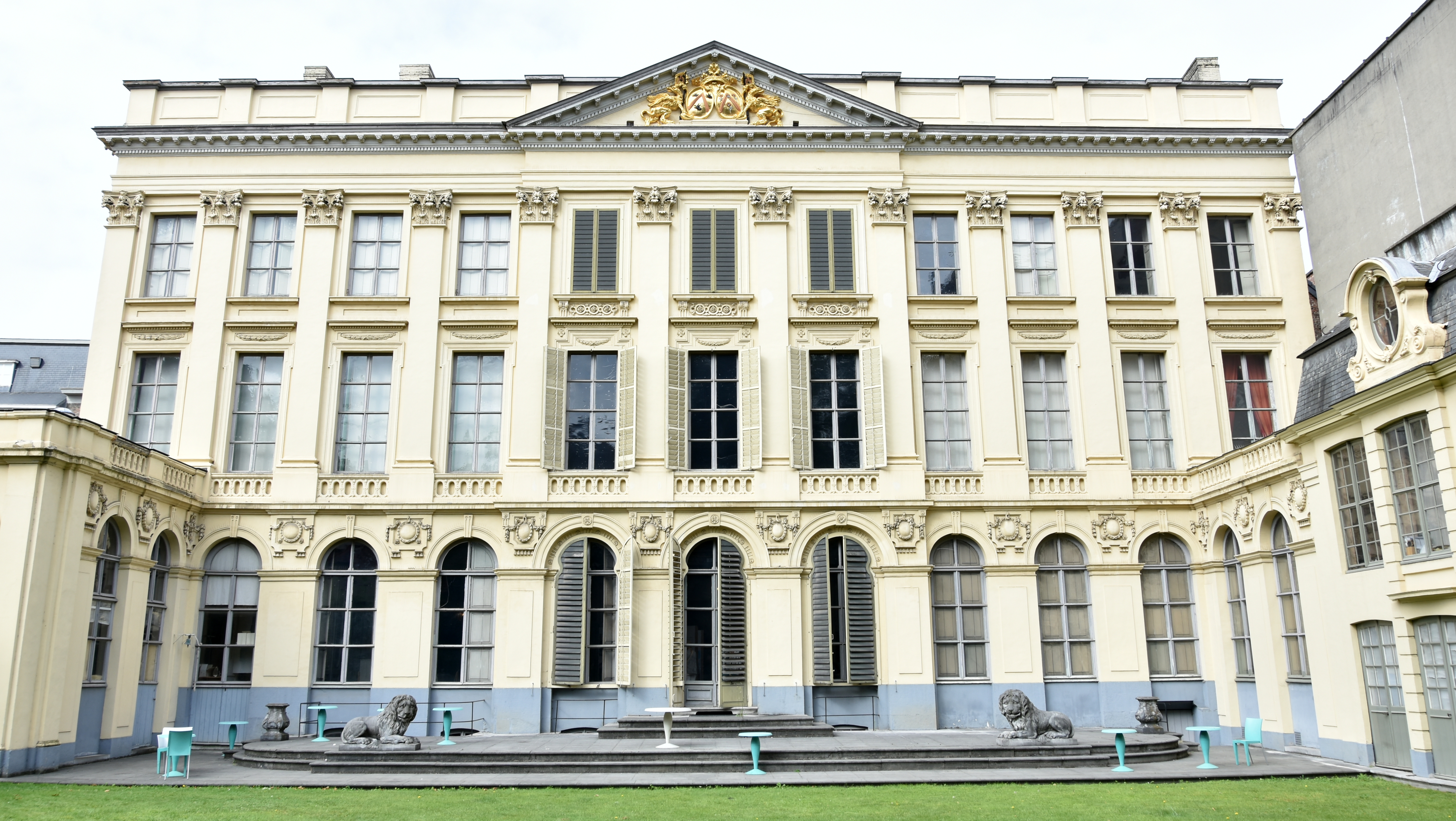 Gent - Hotel d'Hane-Steenhuyse, een stadspaleis aan de Veldstraat - op de foto de classicistische achtergevel opgetrokken in de 18e eeuw